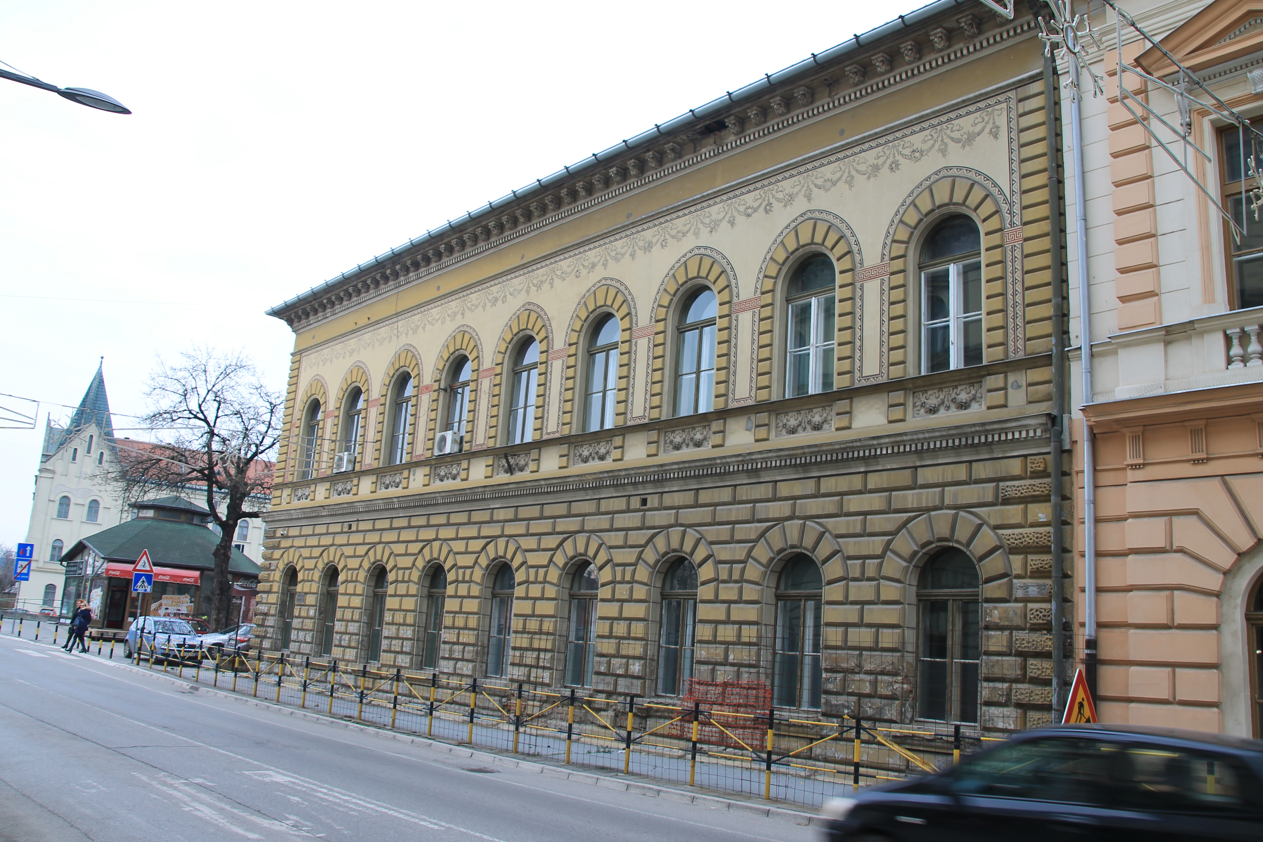 Staro jezgro Zrenjanina